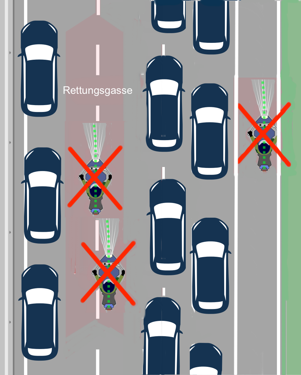 Motorradfahrer benutzen regelwidrig die Rettungsgasse